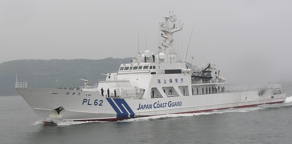 福岡海上保安部所属 巡視船はかた